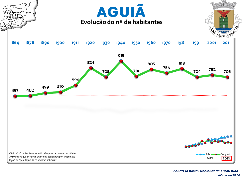 Censoa 1864/2011